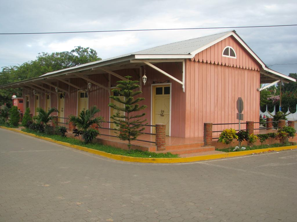 Renovada estación del ferrocarril Nagarote.